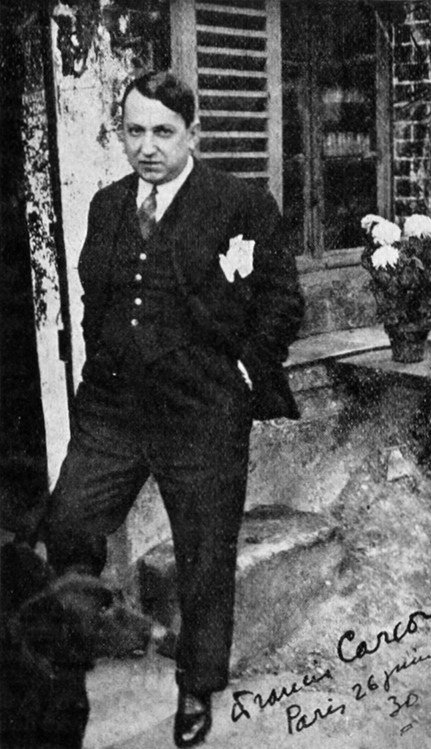 Francis Carco (1886-1958), est un écrivain, poète, journaliste et auteur de chansons français.